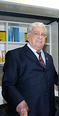 Ex-governador Pedro Pedrossian